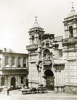 Antigua Iglesia de Nuestra Señora de los Desamparados en Lima